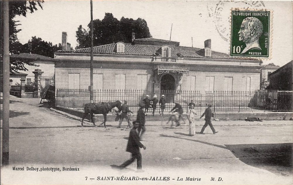 La mairie avant sa transformation en 1934.